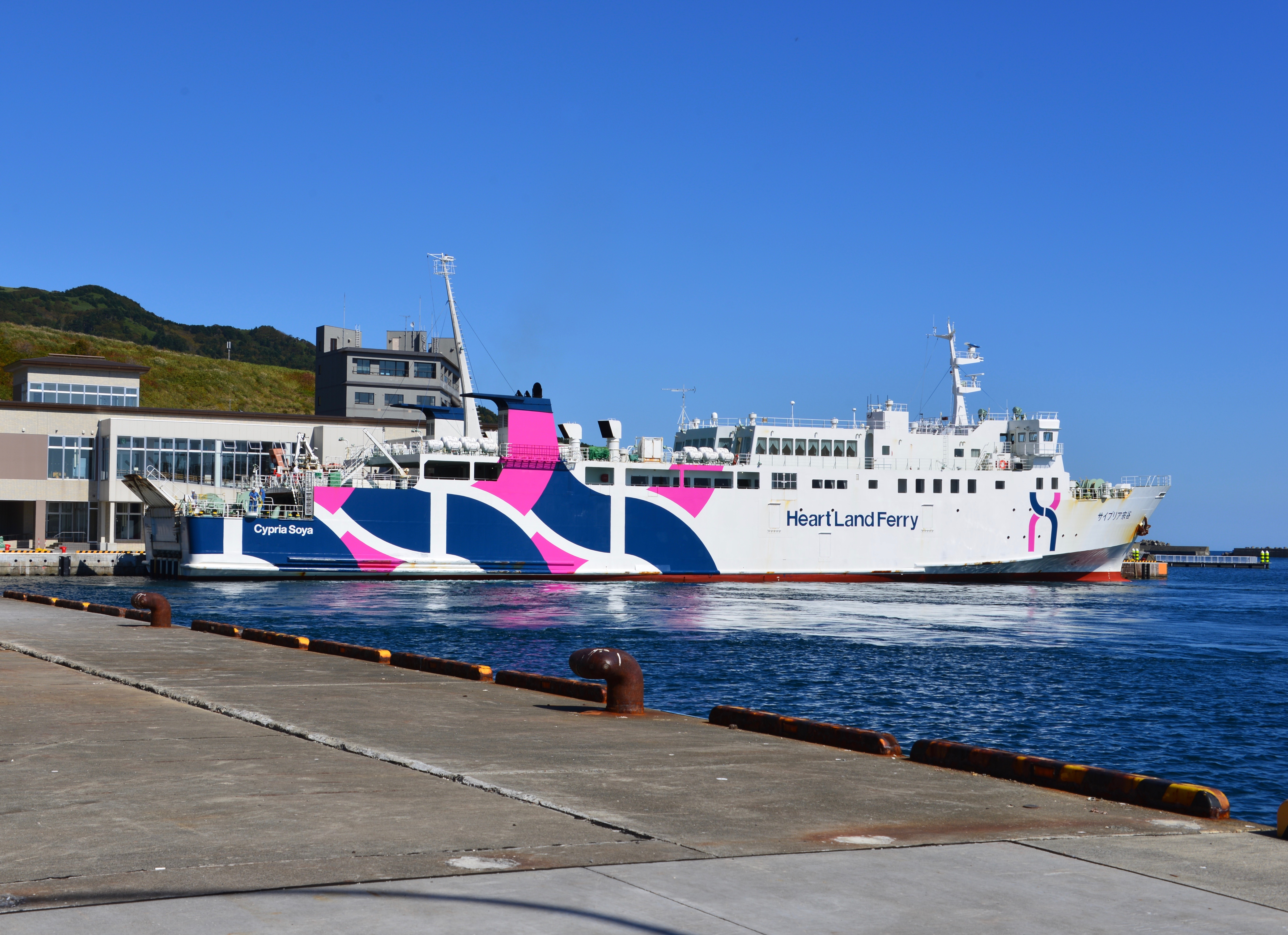 礼文島香深港に停泊するサイプリア宗谷